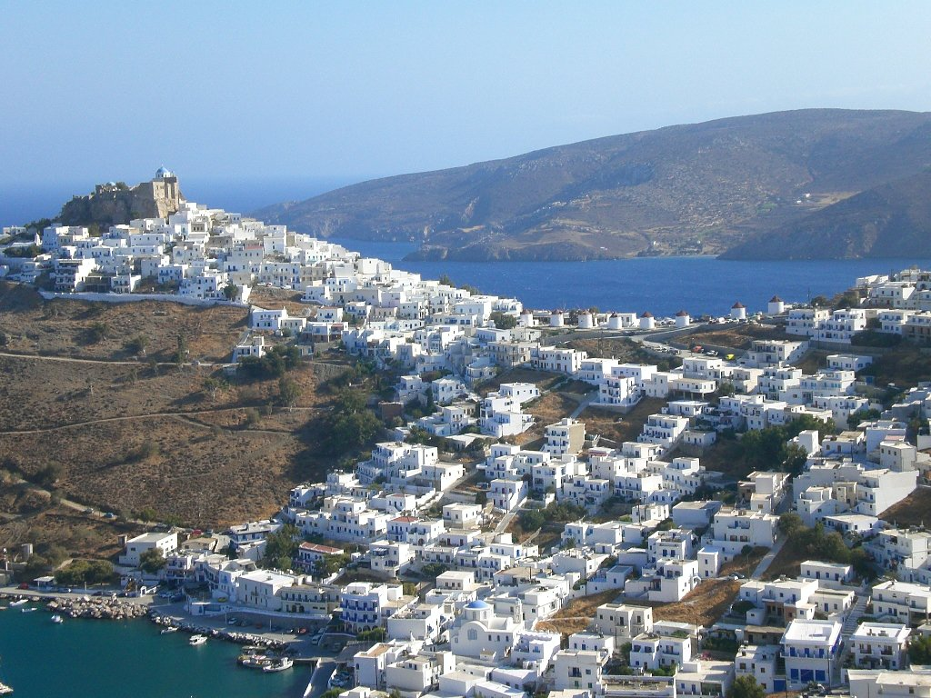 Titel: Blik op Kastro, Chora en Pera Gialo Locatie: Astypalea , Griekenland) Datum: 10 september 2006 Fotograaf: Gebruiker:IMFJ